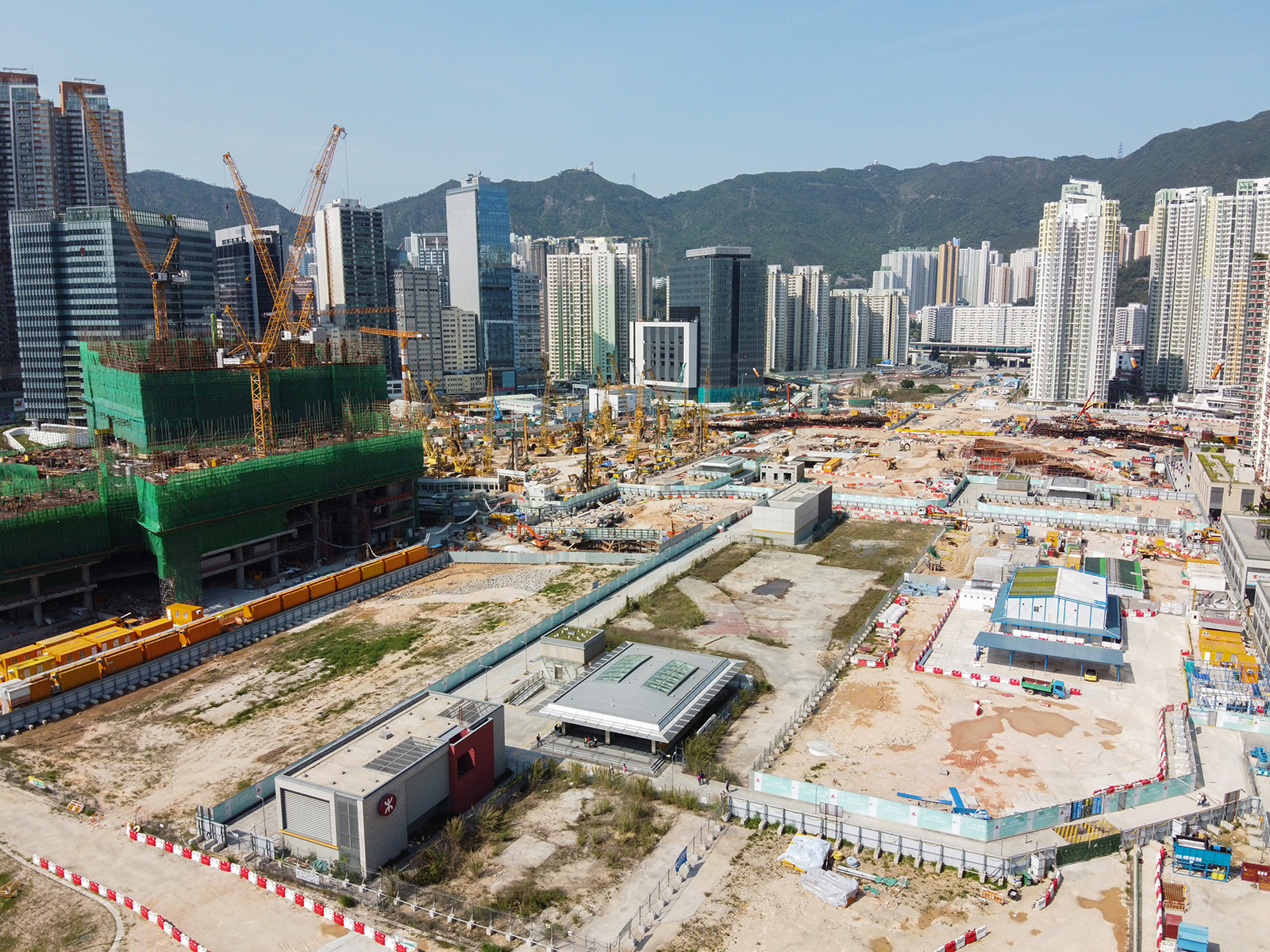 Kai Tak Station Plaza site